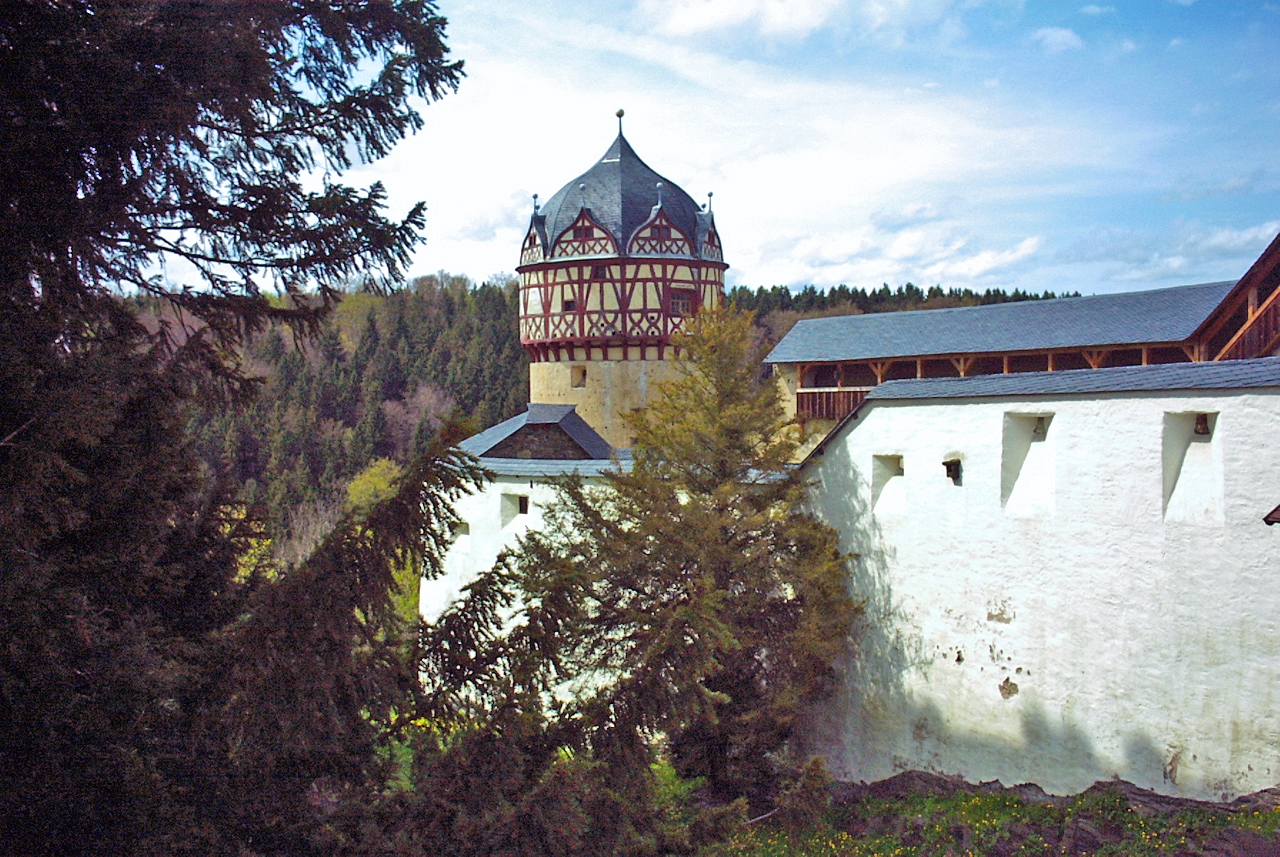 Schloss Burgk, 2002